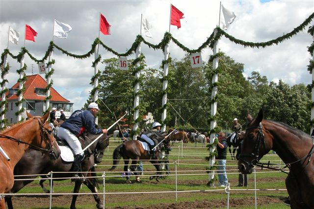 Ringridning